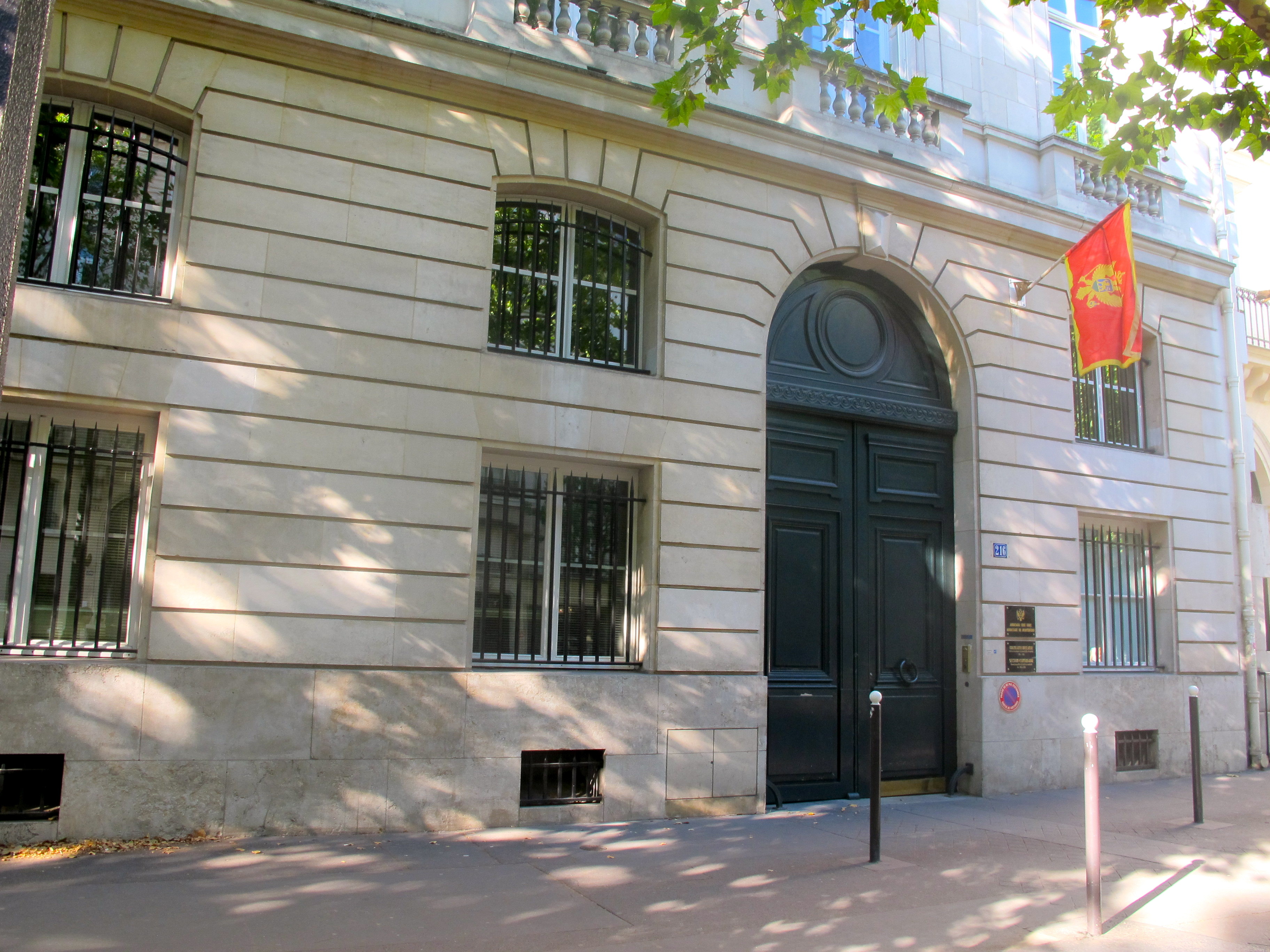 Ambassade du Monténégro à Paris, 216 boulevard Saint Germain (Paris, 7e).